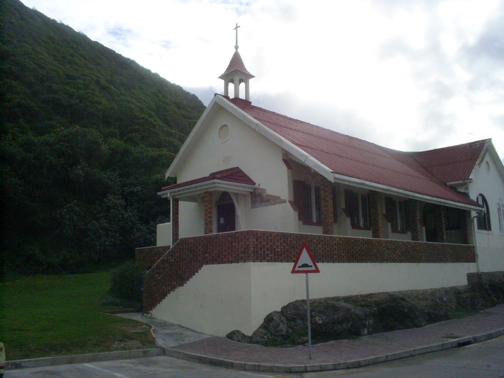 Heroldsbaai se Rooms-Katolieke kerk.